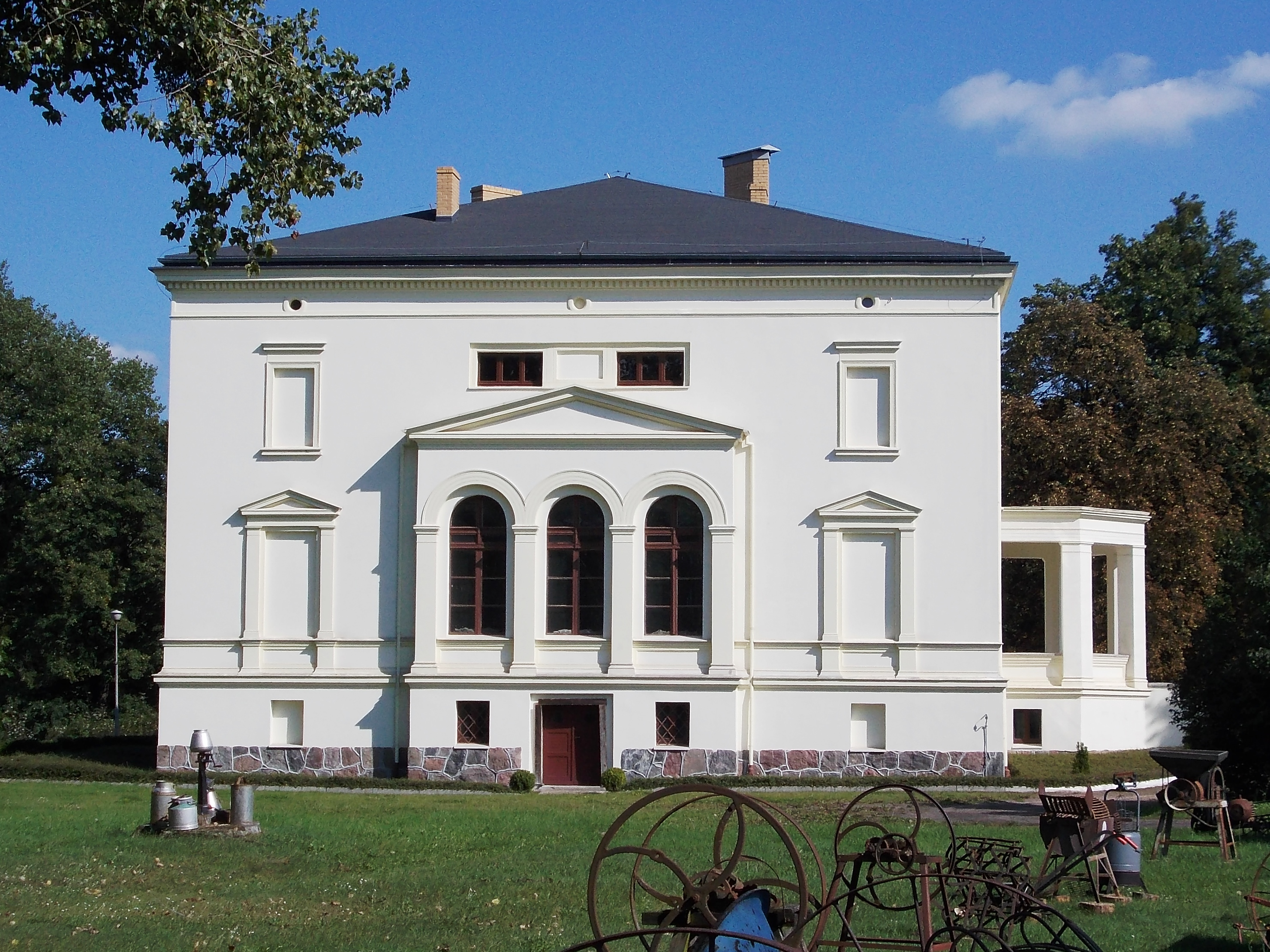 Samoklęski Duże - zespół pałacowy, 2 poł. XIX: pałac (dec. dwór), ok. 1870, 1960